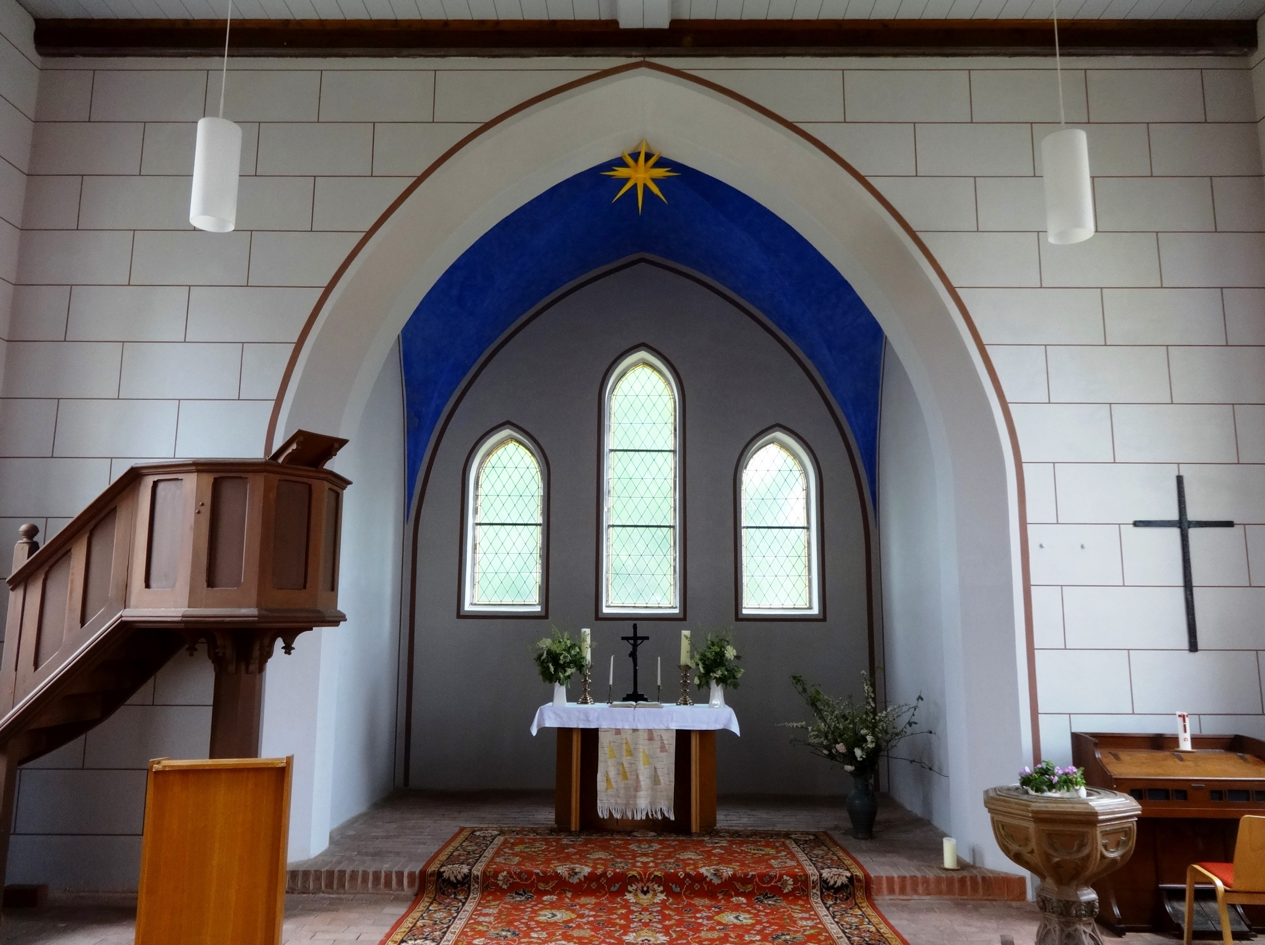 Die Dorfkirche Rieben wurde im Stil der romanischen Neugotik in den Jahren 1817 bis 1820 errichtet. Im Jahr 1896 erweitere die Kirchengemeinde die Saalkirche und schaffte eine Orgel an. Nachdem in den 1970er Jahren bei einer Sanierung ein Putz verwendet wurde, der das Bauwerk schädigte, sanierte die Gemeinde den Sakralbau in den Jahren 2006 bis 2012. Das Sanierungskonzept sah dabei sowohl eine kirchliche, wie auch kommunale und soziale Nutzung vor.